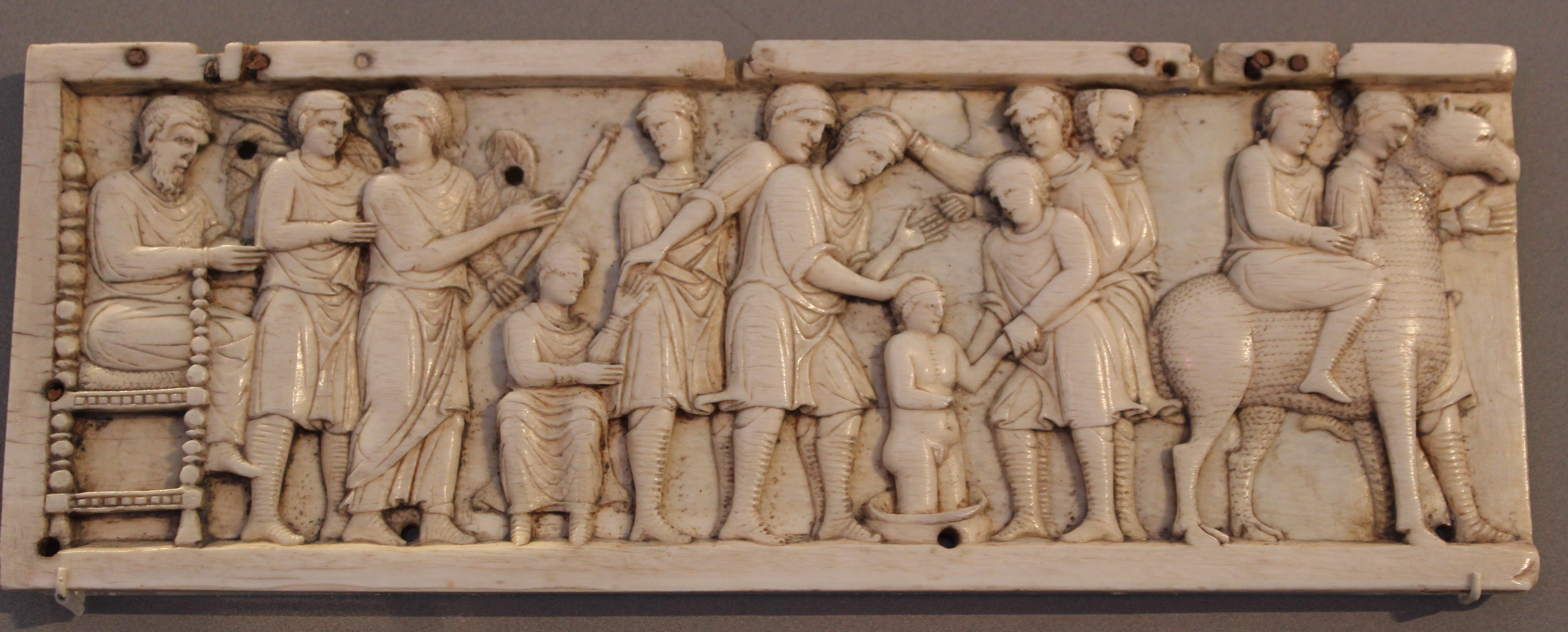 Berlín, Bode-Museum, marfil bizantino con escenas de la vida de José. Constantinopla s. XII..